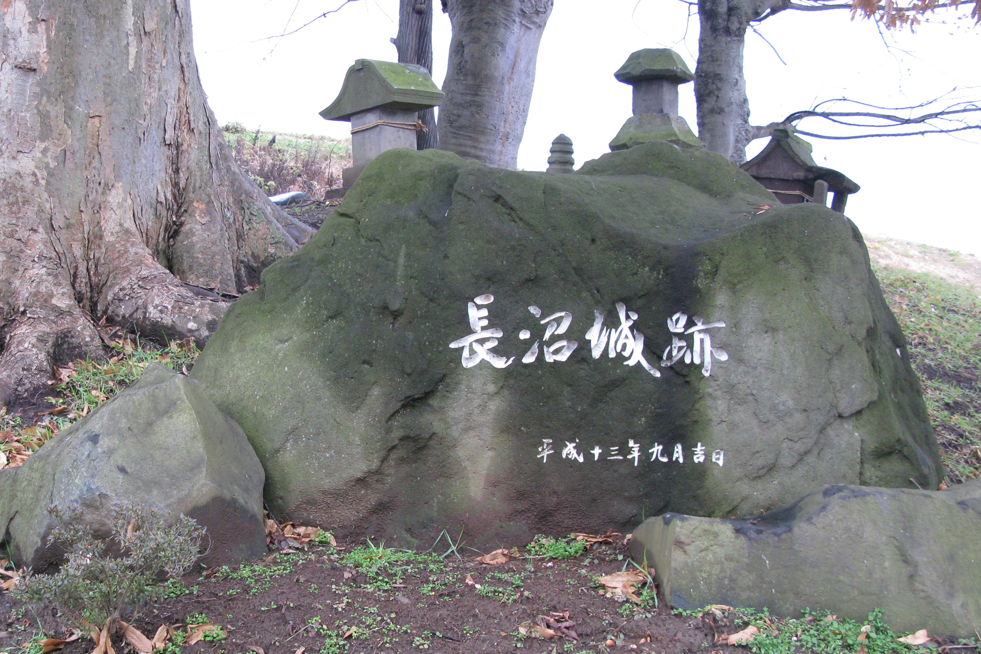 長沼城跡の石碑